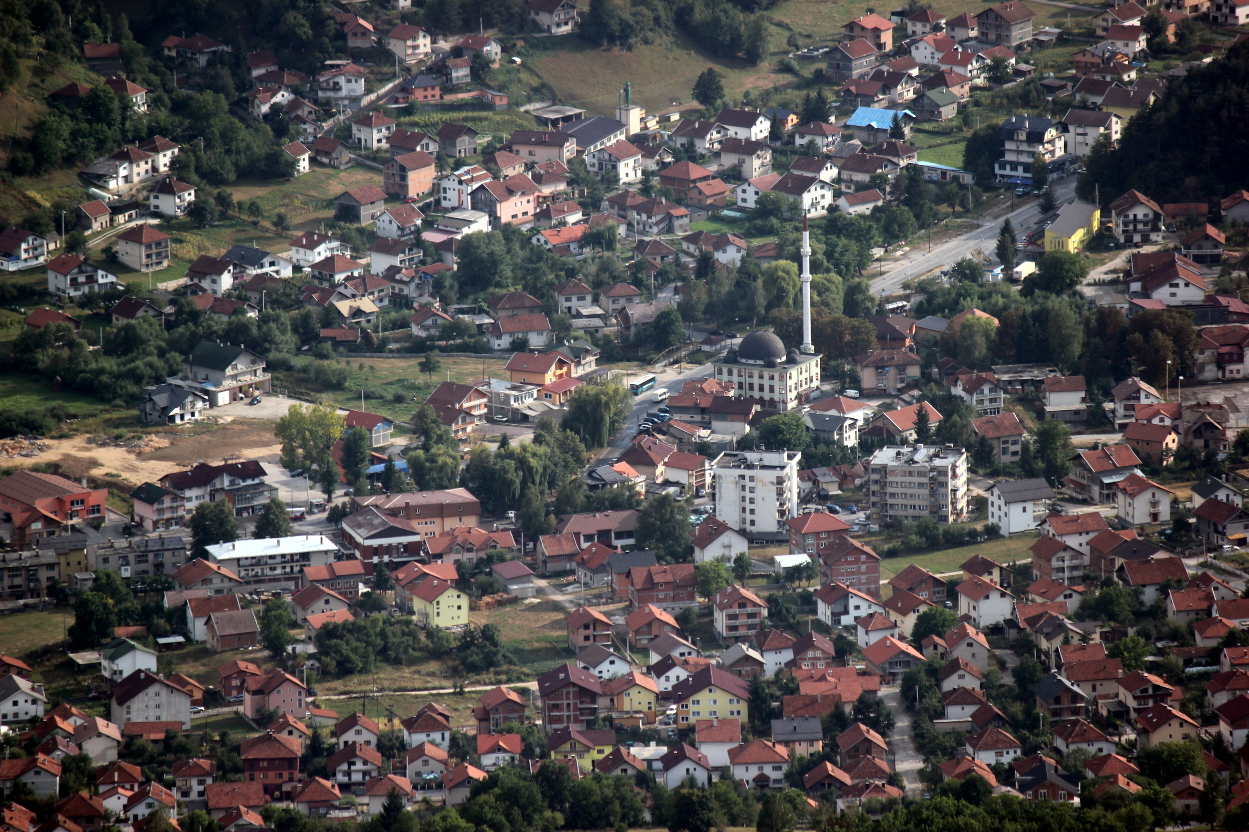 Blick vom Vlašić auf das Ortszentrum von Turbe.